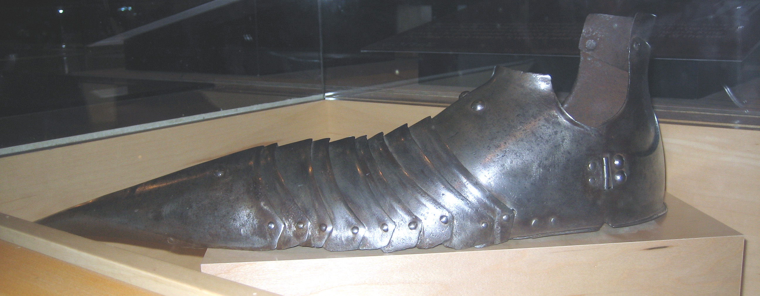 A knight's (metal) shoe.